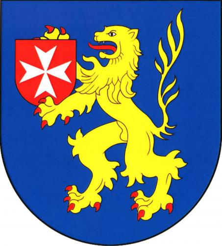 Sezemice, okres Mladá Boleslav, znak